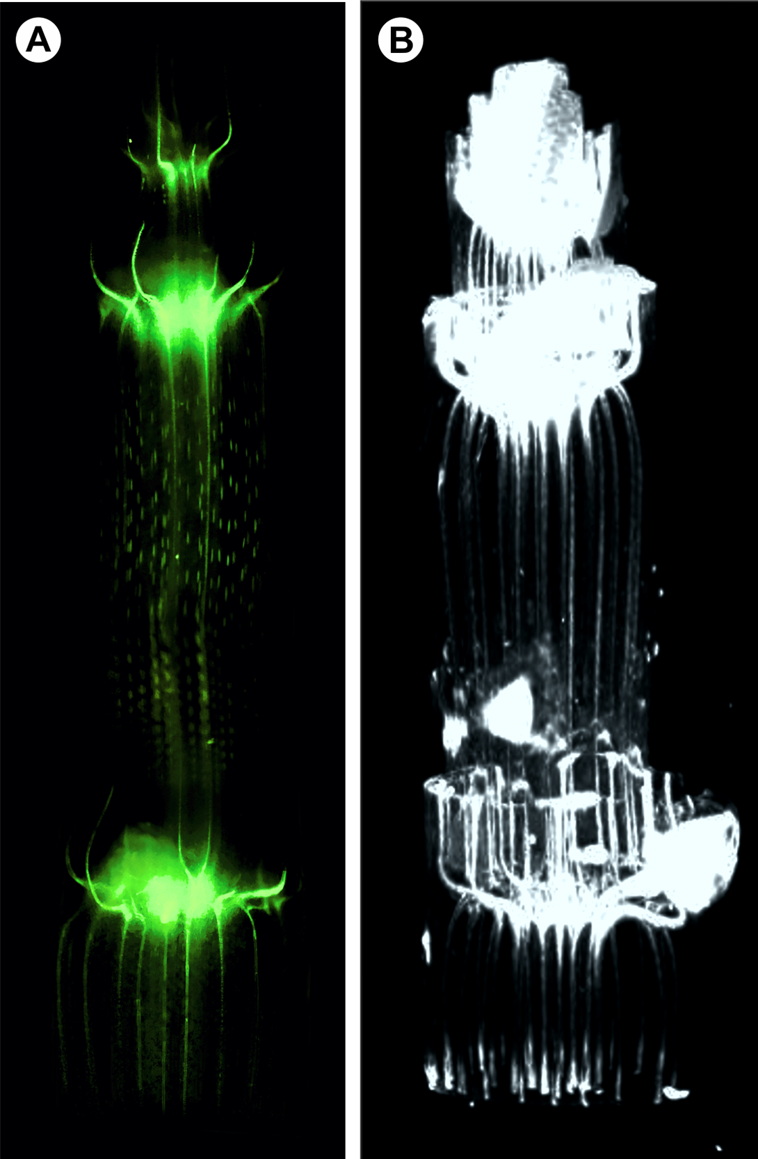 Fig 9. Visión general del curso de los haces vasculares a lo largo del eje principal del tallo. A) Diafanización de montaje total del vértice de brotes de Tradescantia zebrina Heynh. ex bosse. B) análisis μCT por la atenuación de contraste de la ápice del brote de T. Zebrina, contrastada con el citrato de plomo.